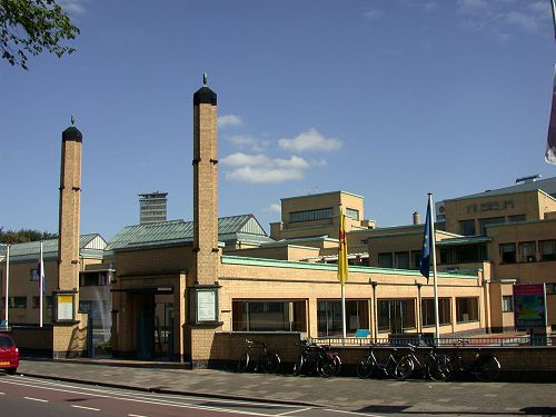 Zicht op een deel van het Kunstmuseum Den Haag in Den Haag, zelf gemaakt, GNU